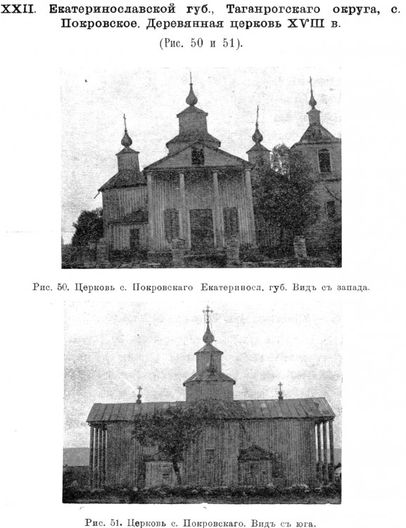 Церковь Покрова Пресвятой Богородицы (деревянная) в селе Покровское Неклиновского района Ростовской области.